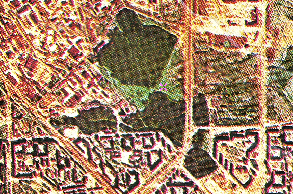 Казань Горкинский лес и Ометьевский лес